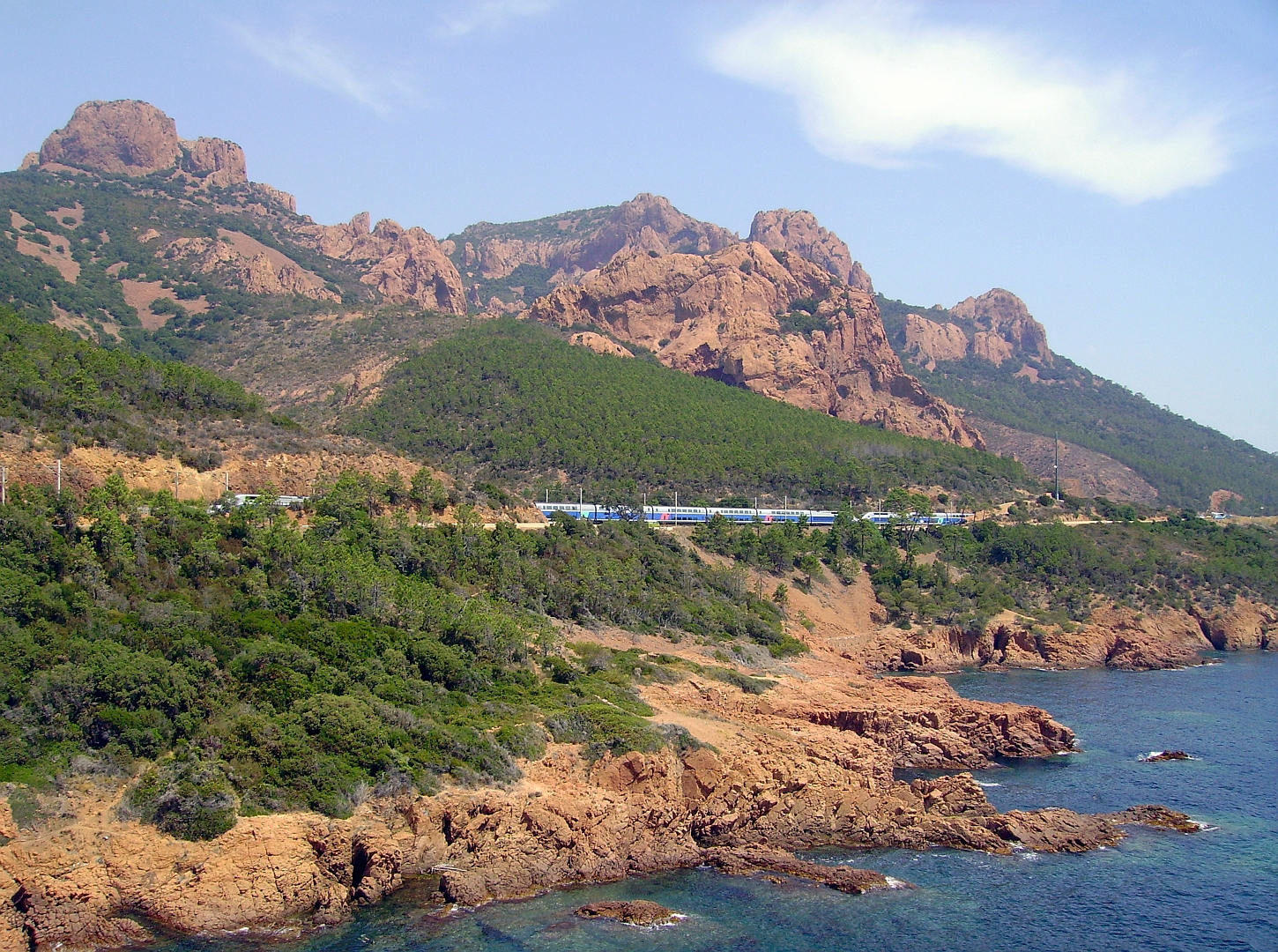 Passage d'un TGV Duplex au Cap Roux le 28/07/2006.